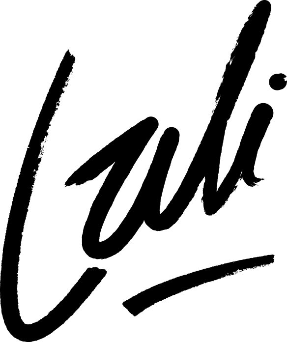 Logo de Lali Espósito como artista musical.